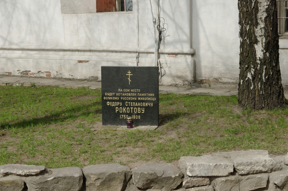 Памятный камень на территории Новоспасского монастыря